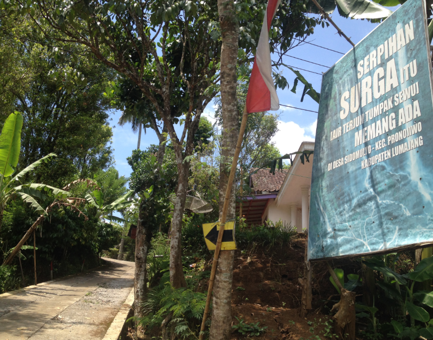 jalan masuk menuju Air Terjun Tumpak Sewu